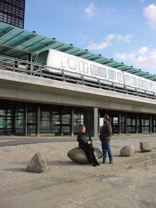 Ørestad Metro-stationHans Jørn Storgaard Andersen